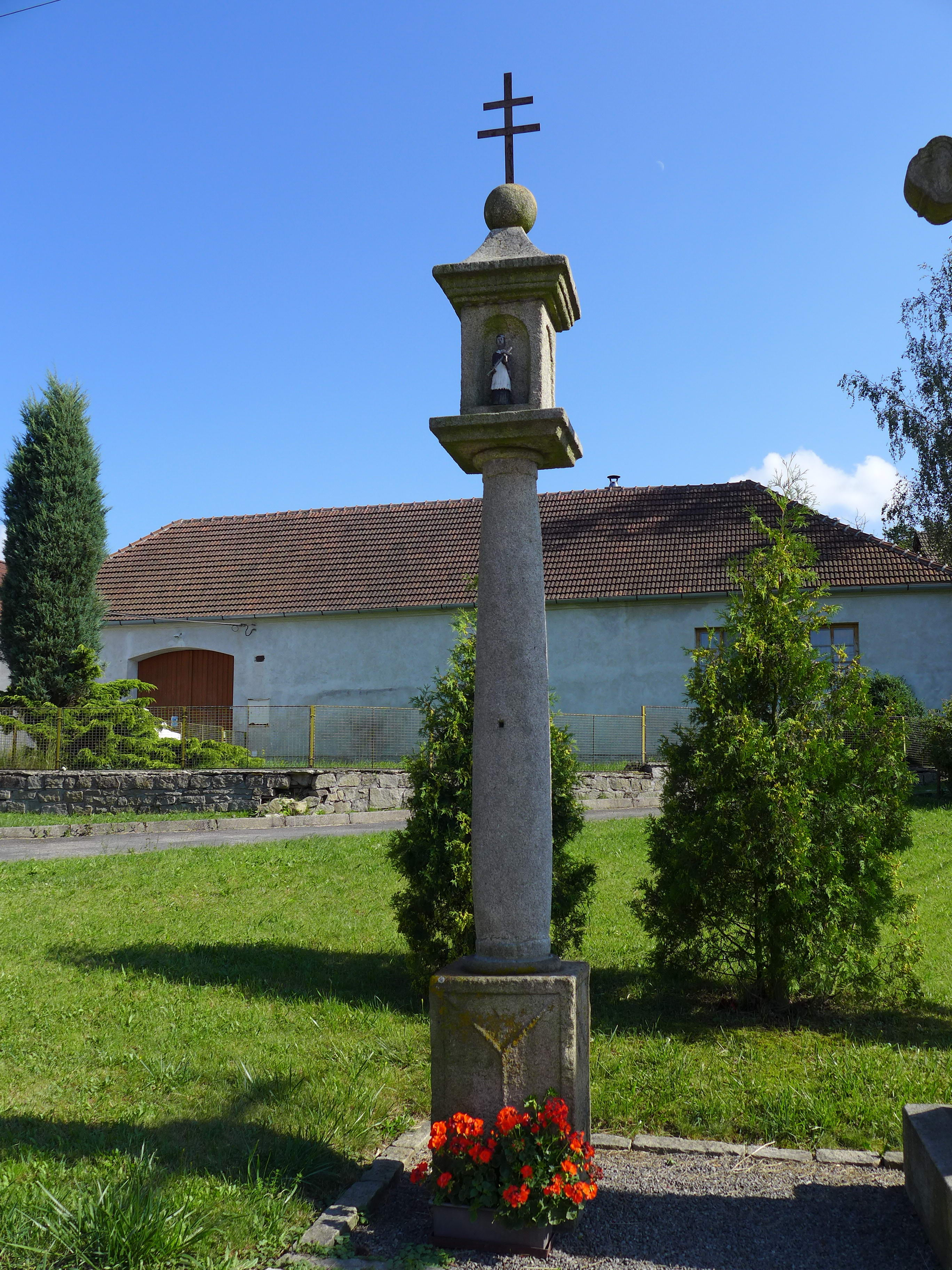 Boží muka, náves, Nevcehle.